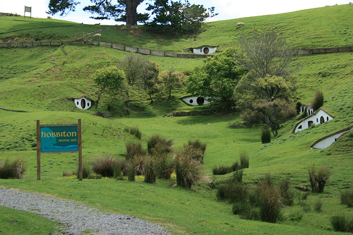 Matamata, La Comarca en la película de El Señor de los Anillos